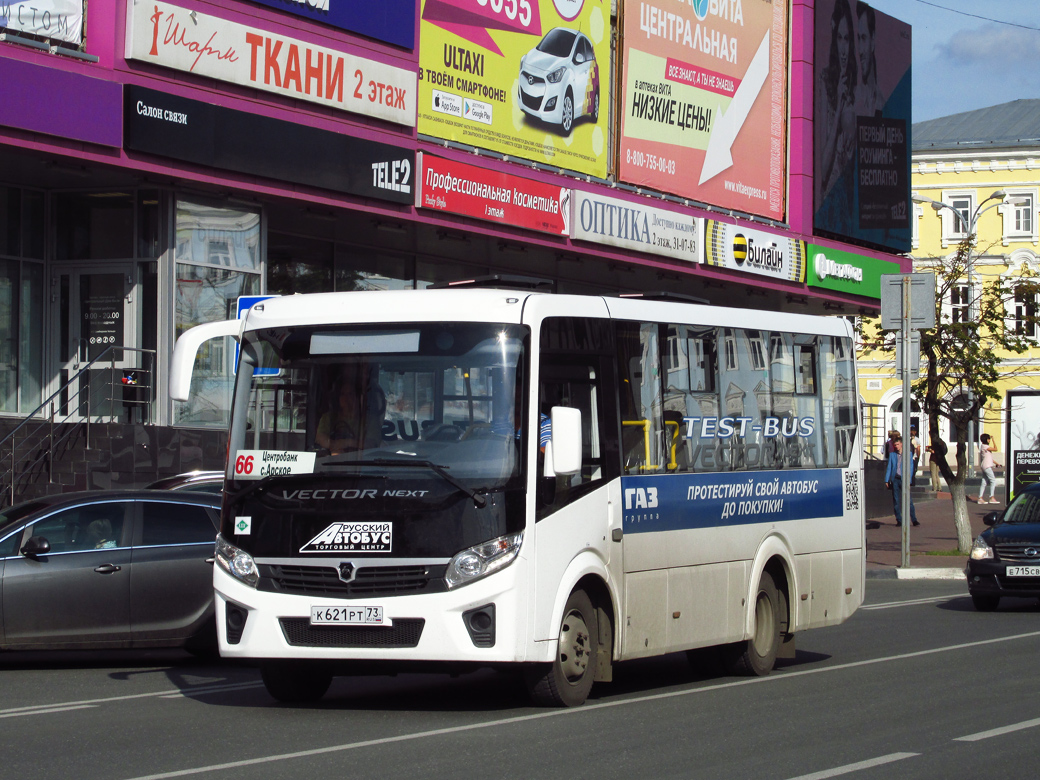 Автобус ПАЗ Вектор Next на тестовой эксплуатации в Ульяновске.